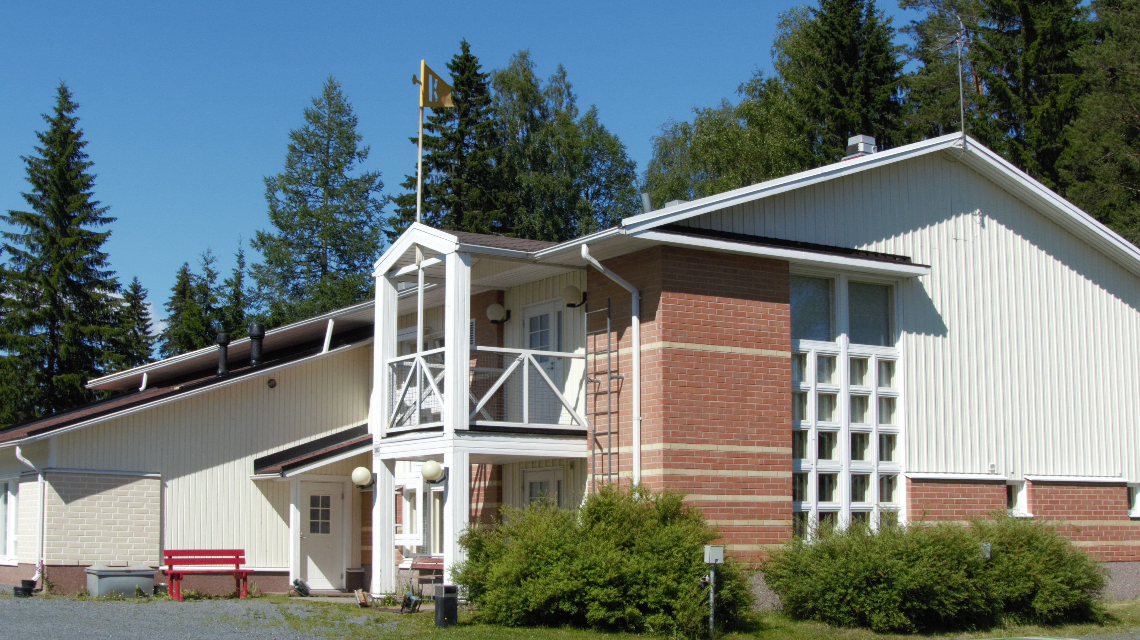 Kouran liikuntahalli Kouran kylässä Seinäjoella.